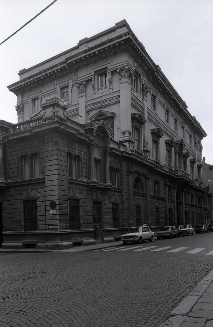 Servizio fotografico : Italia, 1981 / Paolo Monti. - Strisce: 2, Fotogrammi complessivi: 7 : Negativo b/n, gelatina bromuro d'argento/ pellicola ; 35 mm. - ((Sul portanegativi: N[I]K[MA]T FP4. - La serie è identificata da Monti con segni grafici e distinta dalla successiva. - Occasione: Documentazione di antiche ville nel territorio (secondo accordi con il Signor Tirotti). - Fonte: Agenda di Paolo Monti: Nikon Leika 3001-/ Monti 1978 (1978-1982), presso Archivio Paolo Monti. N. 140 riprese stampate in formato 24x30. - Fonte: Fattura di Paolo Monti: IV. Commesse/ Fattura n. 44/ Riprese fotografiche antiche ville nel territorio di Piacenza (1981/12/30), presso Archivio Paolo Monti. N. 140 riprese stampate in formato 24x30